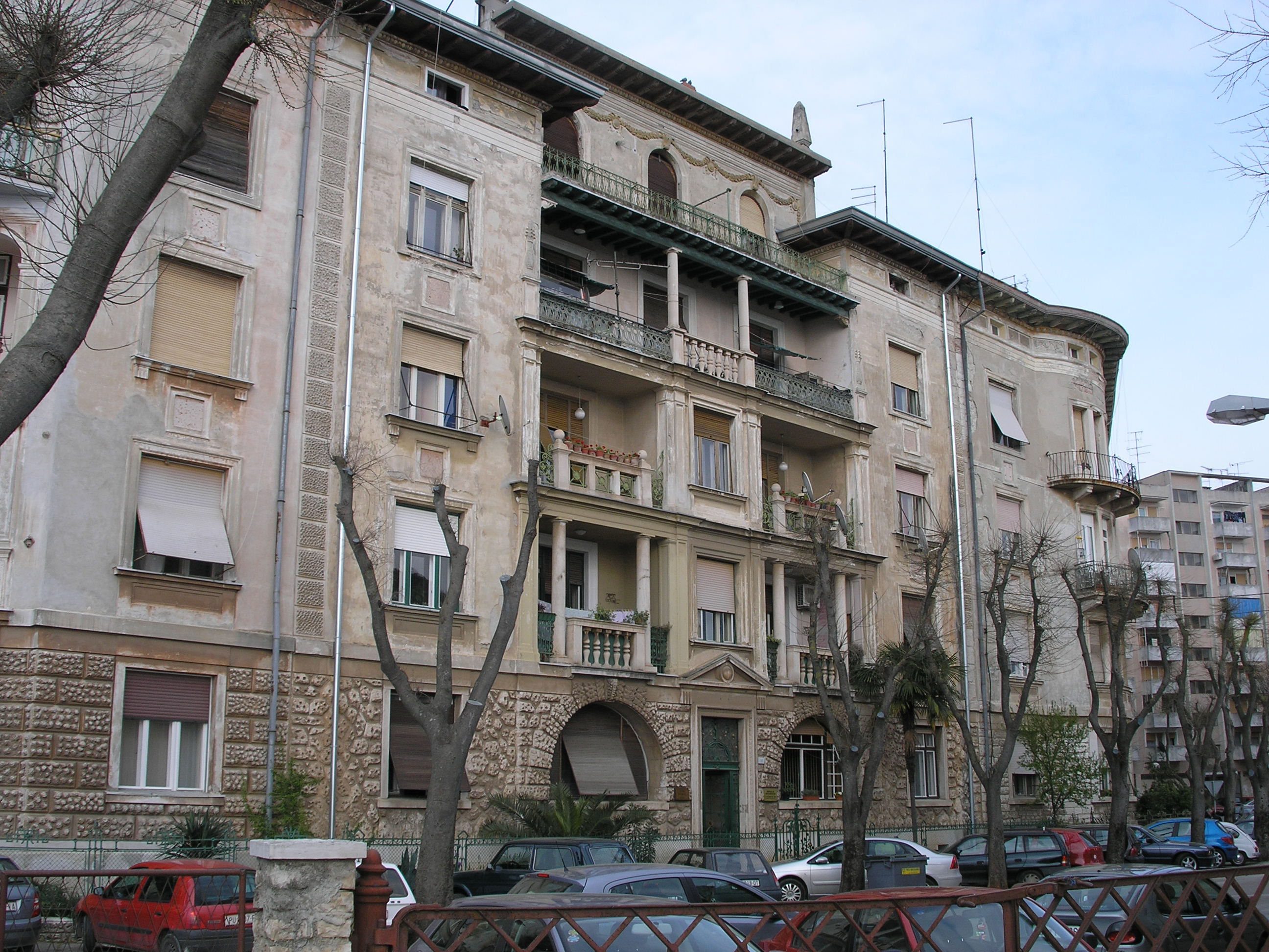 self-made